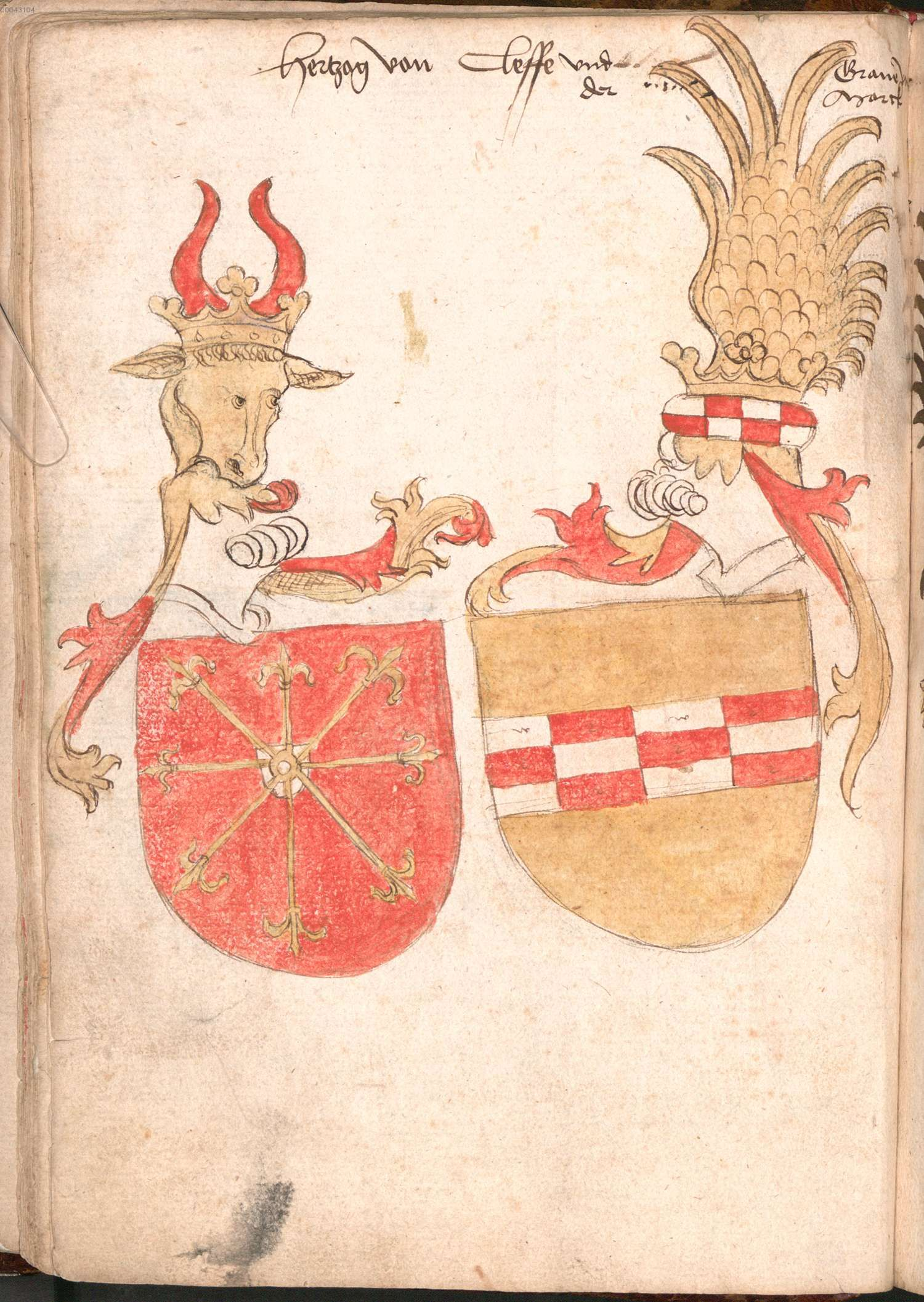 „Wernigeroder (Schaffhausensches) Wappenbuch“; Süddeutschland 4. Viertel 15. Jh.Bayerische Staatsbibliothek München, Cod.icon. 308 n Wappen des Herzog von Cleve und des Grafen von der Mark